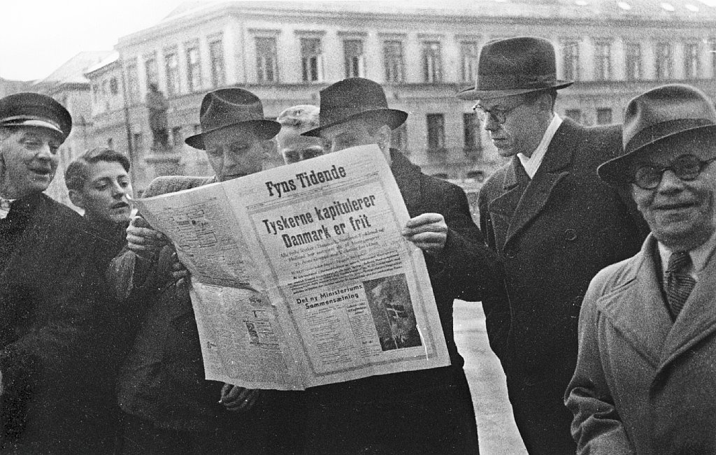 Befrielsesnummeret af Fyns Tidende studeres i Odense d. 5. maj 1945 om morgenen Dato: 5. maj 1945 Sted: Odense, uden nærmere stedsangivelse Fotograf: Christoffersen, Odense Odense, The Liberation of Denmark Se flere billeder her: Download and rights: More about The Museum of Danish Resistance (Frihedsmuseet)